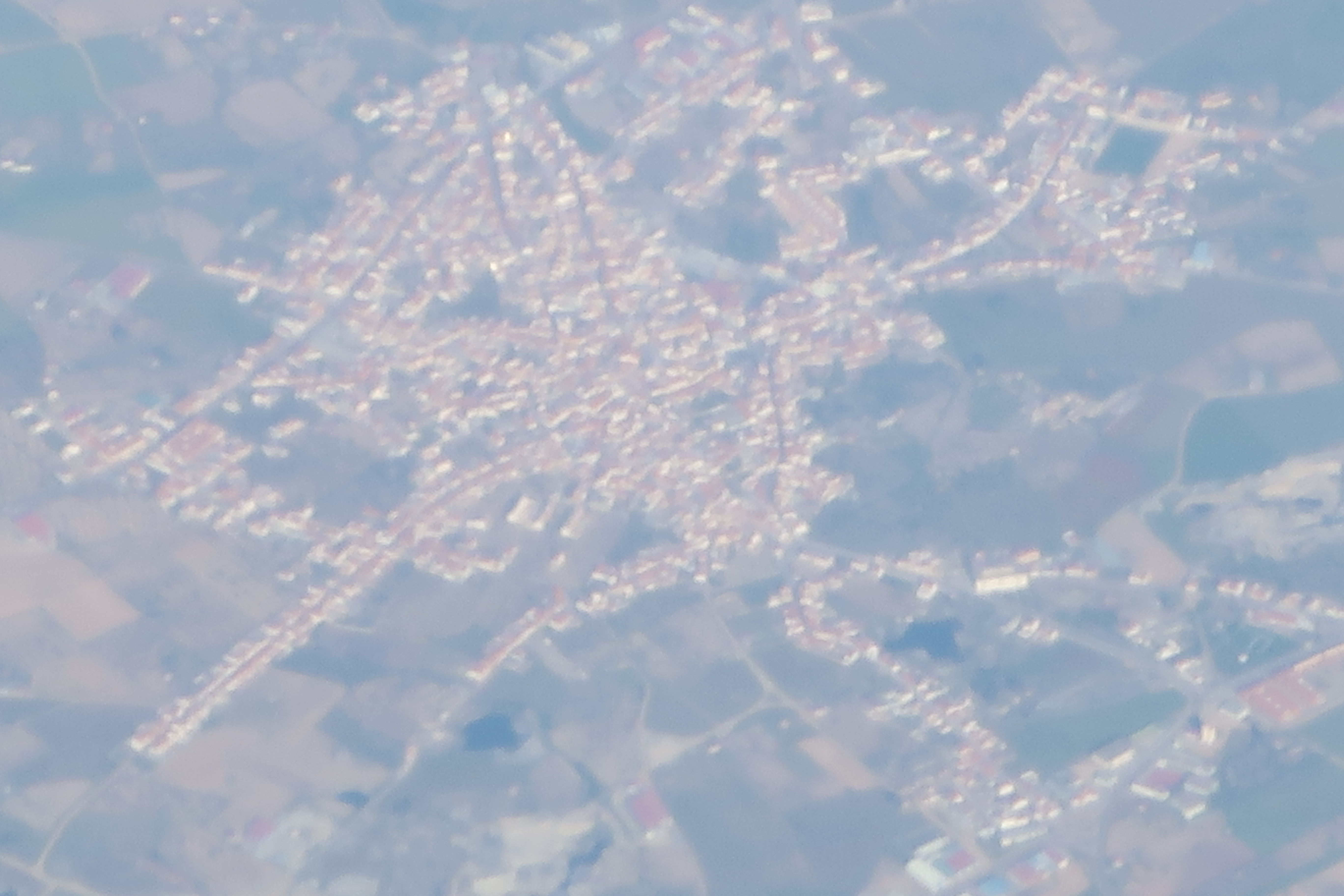 el susodicho pueblo desde el aire